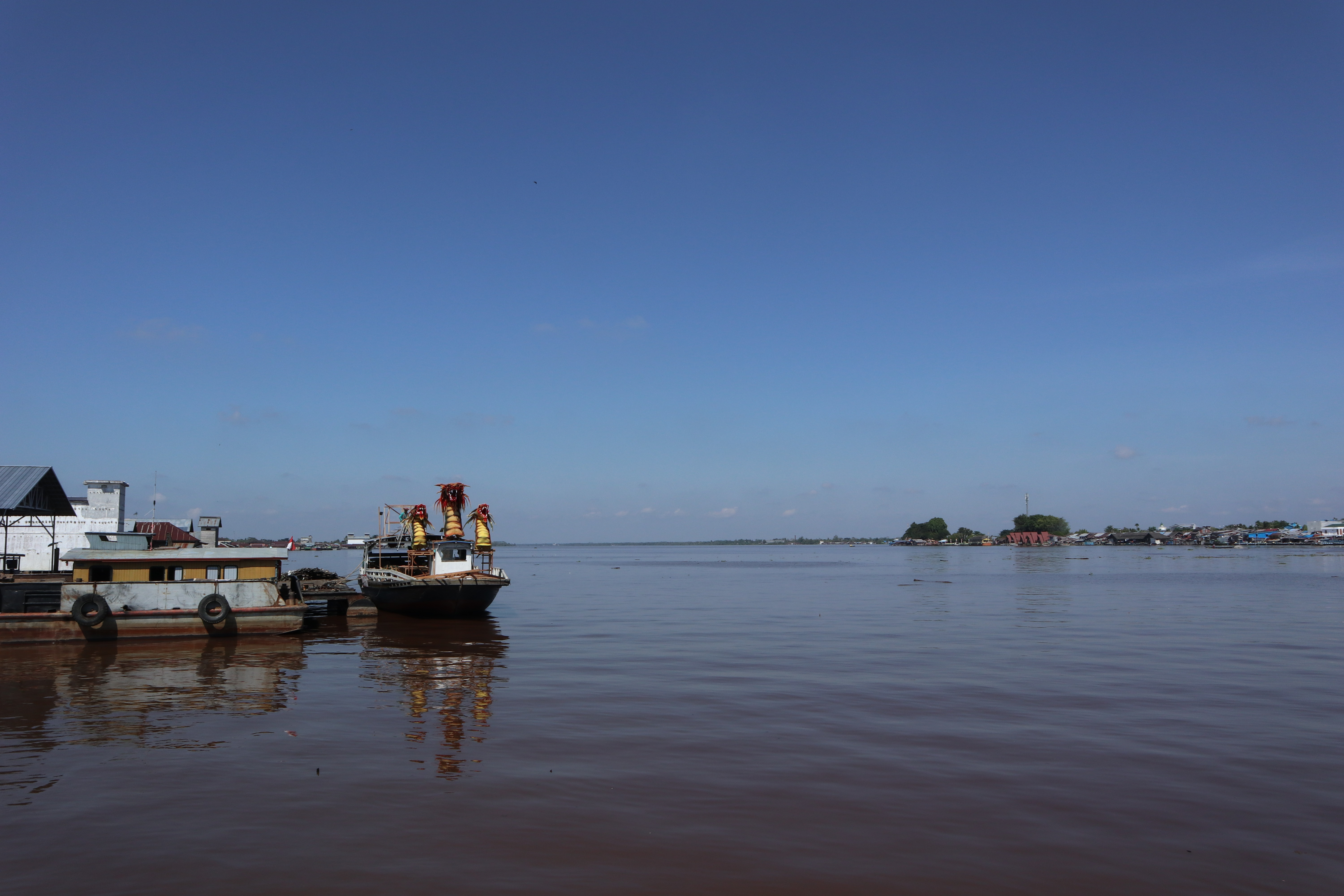 Sungai Kapuas Murung yang bermuara di laut Jawa.